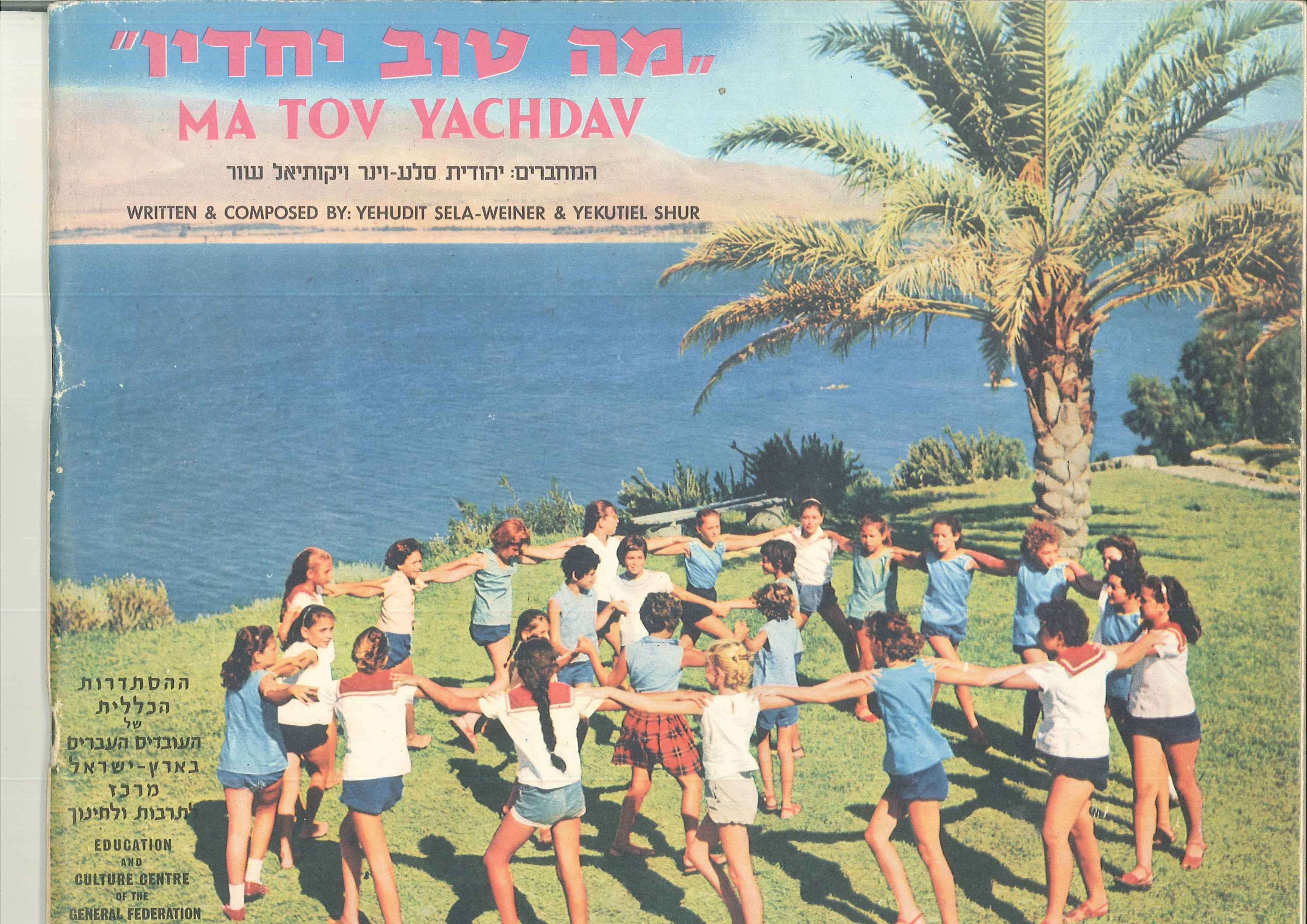 תקליט וחוברת תווים ושירים הכוללים אופרה/ מחזמר לילדים. העלילה עוסקת בחברת הילדים בקיבוץ שיצאו לעזרת ההורים, שהיו מגויסים. היצירה נכתבה לכבוד עשור למדינת ישראל. הוצגה ברחבי ישראל פעמים רבות ואף הועלתה בהיכל התרבות בת"א במעמד ראש הממשלה דוד בן גוריון. באדיבות ארכיון דגניה ב'.